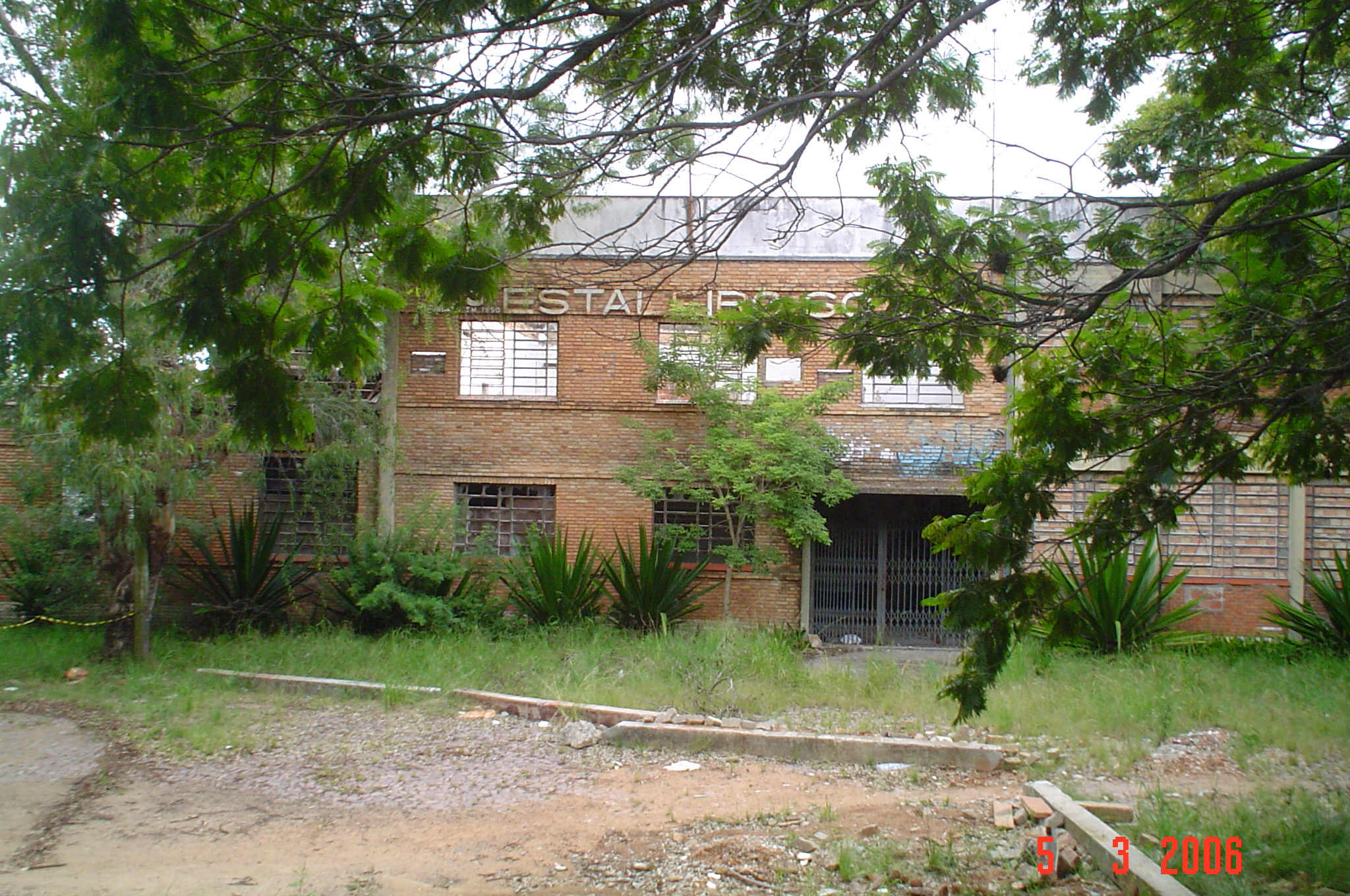 Ruínas do Estaleiro Só, já demolido.